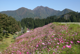 mzlmbyk